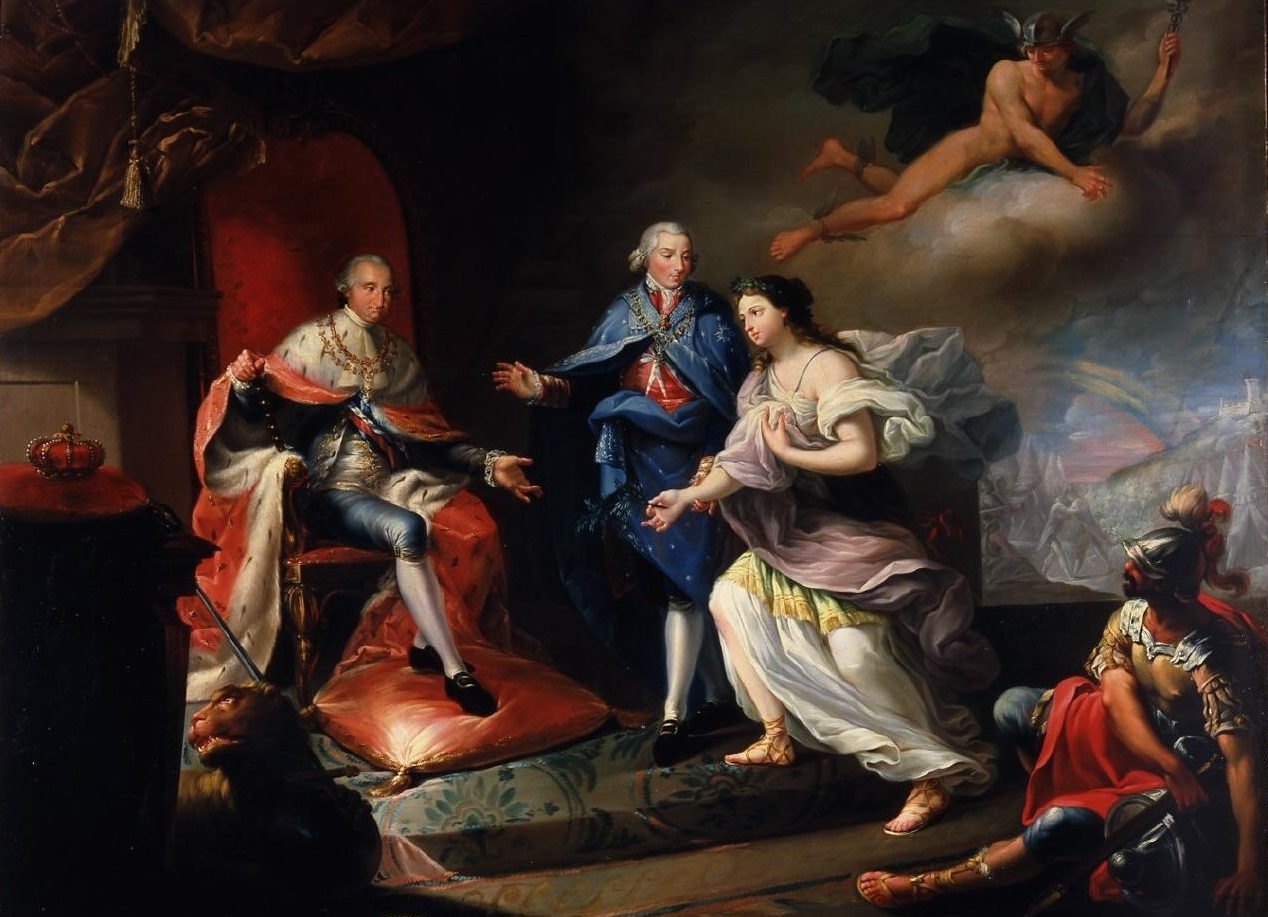 El lienzo muestra a Manuel de Godoy, que fue valido del rey Carlos IV de España, presentando a este monarca la Paz de Basilea, que fue suscrita por Francia y España en 1795.